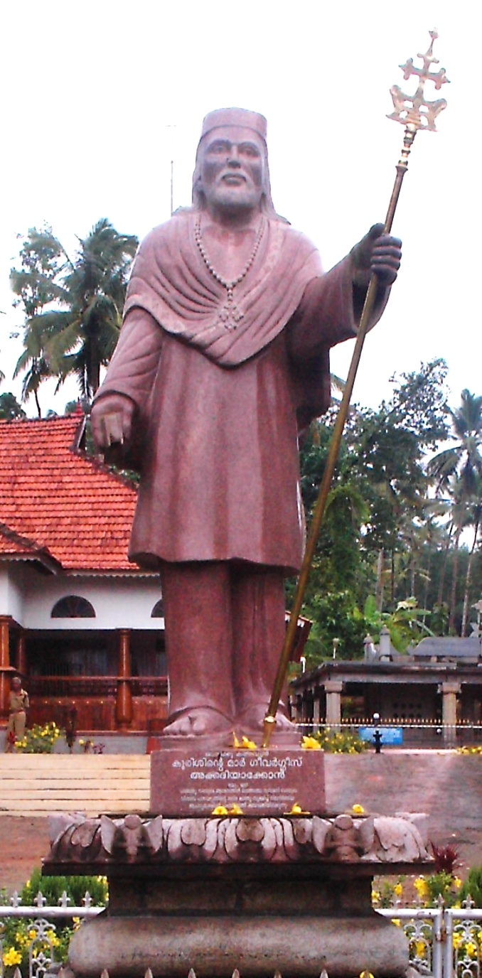 Kuravilangad, Kerala, Indien. Denkmal des Erzdiakons George of the Cross (+ 1640), auf dem Friedhof der Erzdiakone.